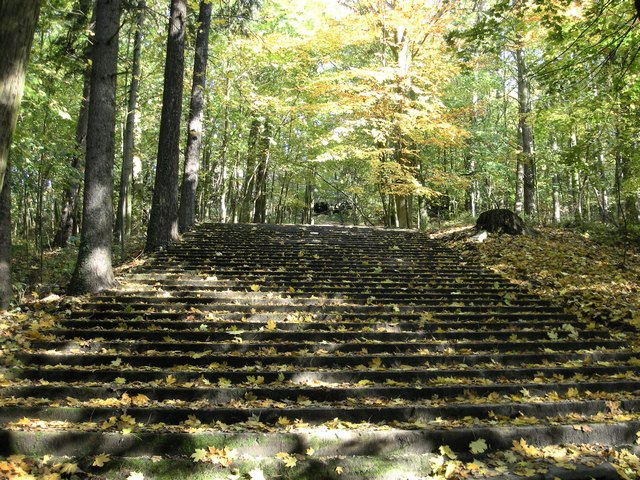 Szczecin, Wzgórze Arkony, Wieża Quistorpa (zabytek nr 171)